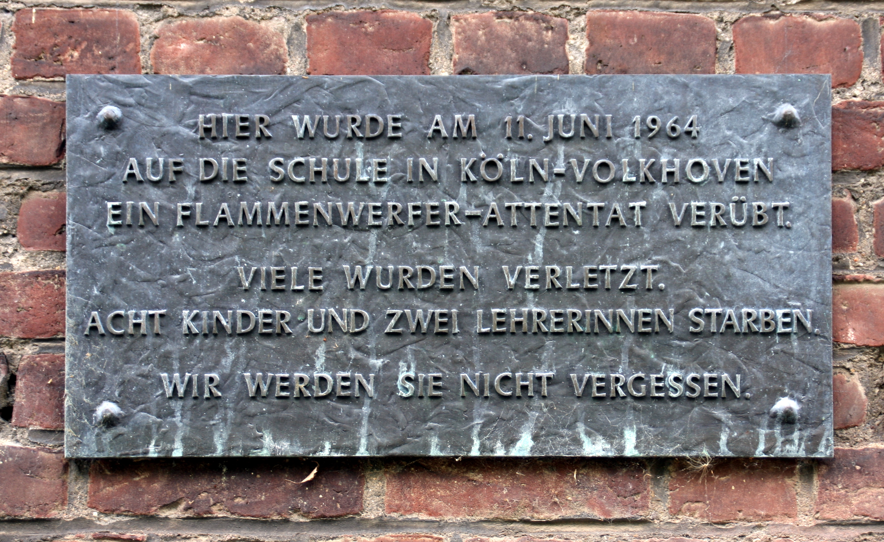 Gedenktafel zum Attentat von Volkhoven an der ehemaligen Schule. Heute befindet sich auf dem Gelände die Simultanhalle.